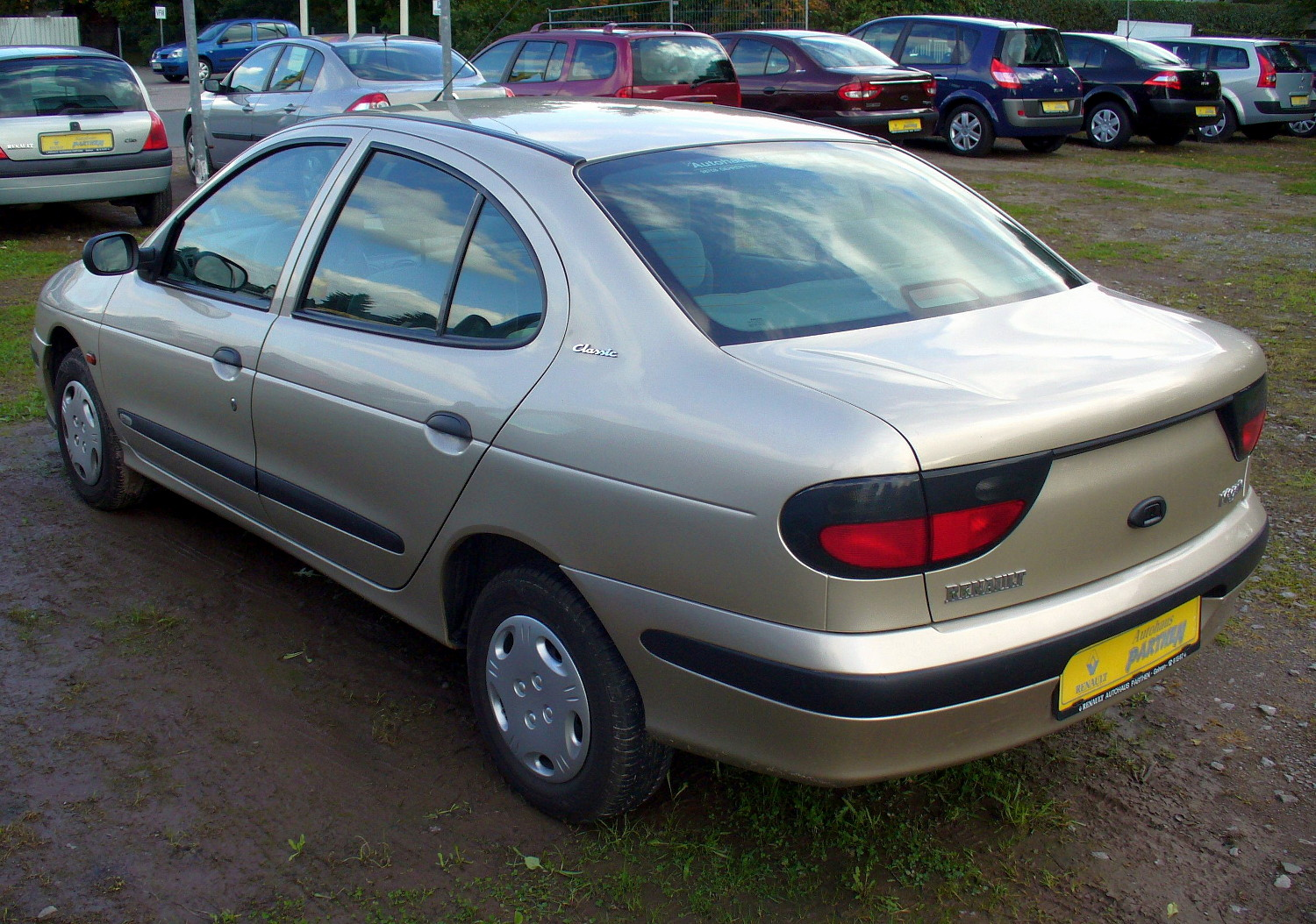 Renault Mégane Classic